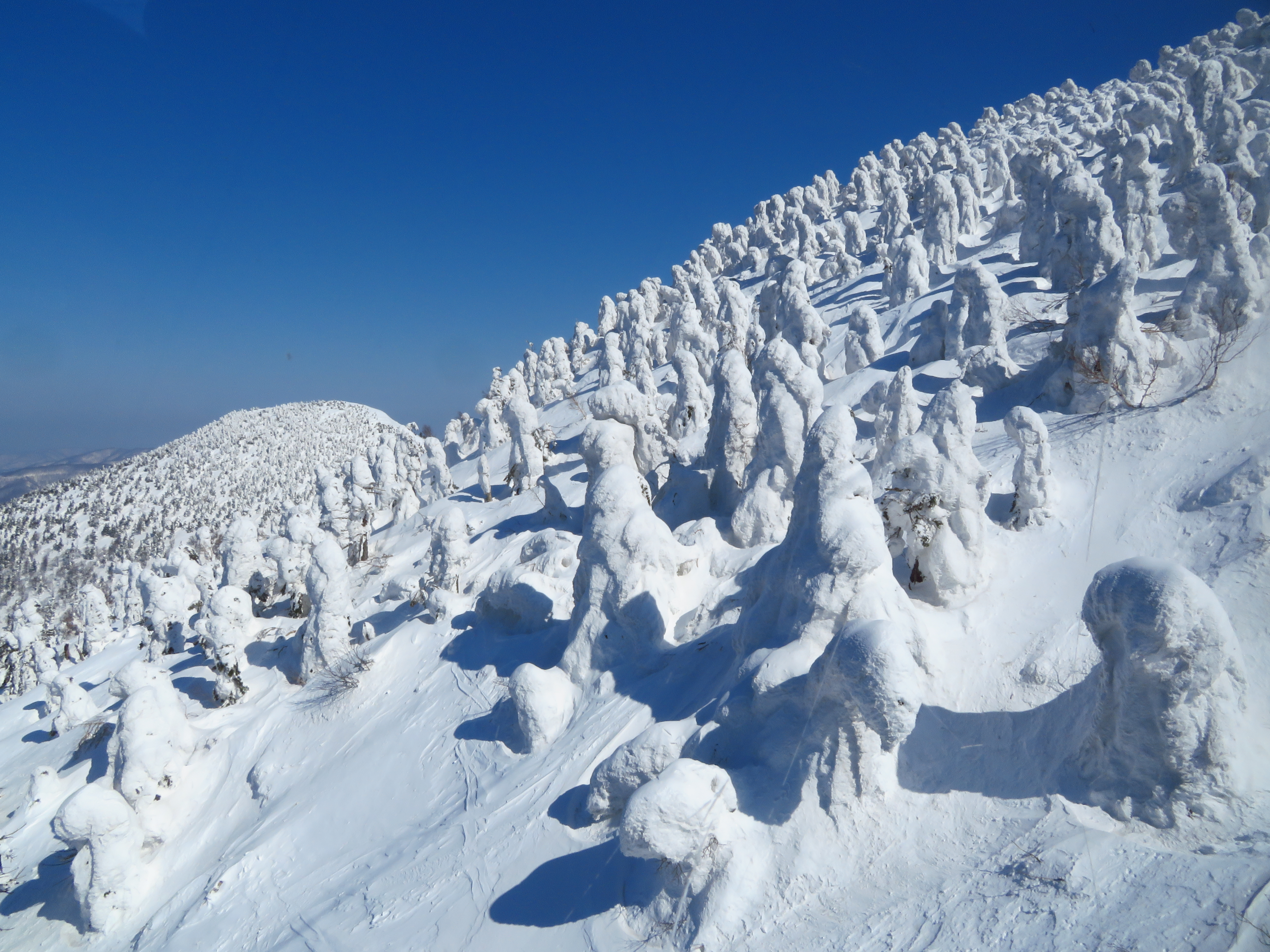 八甲田の樹氷（日本三大樹氷） - 青森県青森市 Canon PowerShot SX720 HS